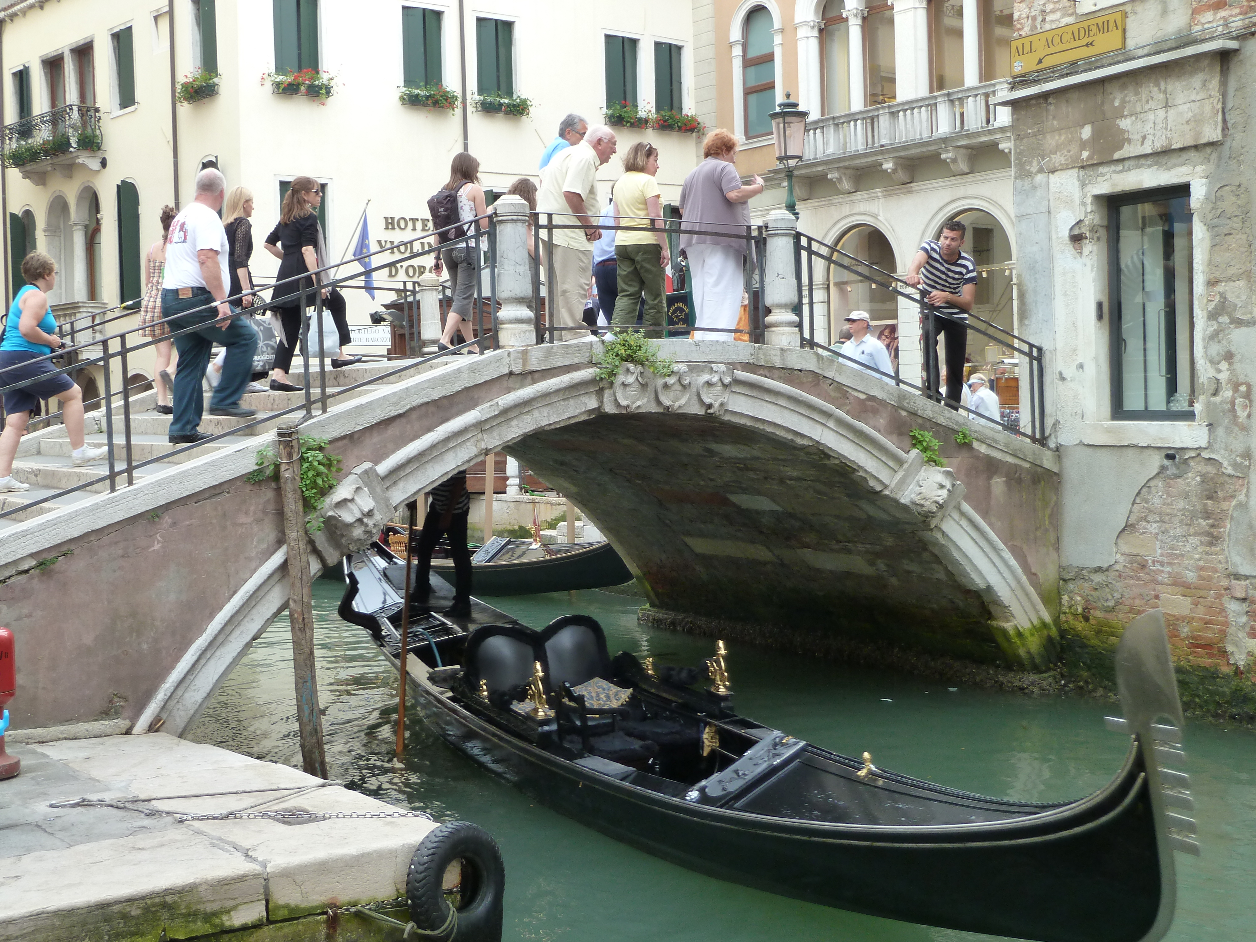 Ponte de San Moise (Venice)